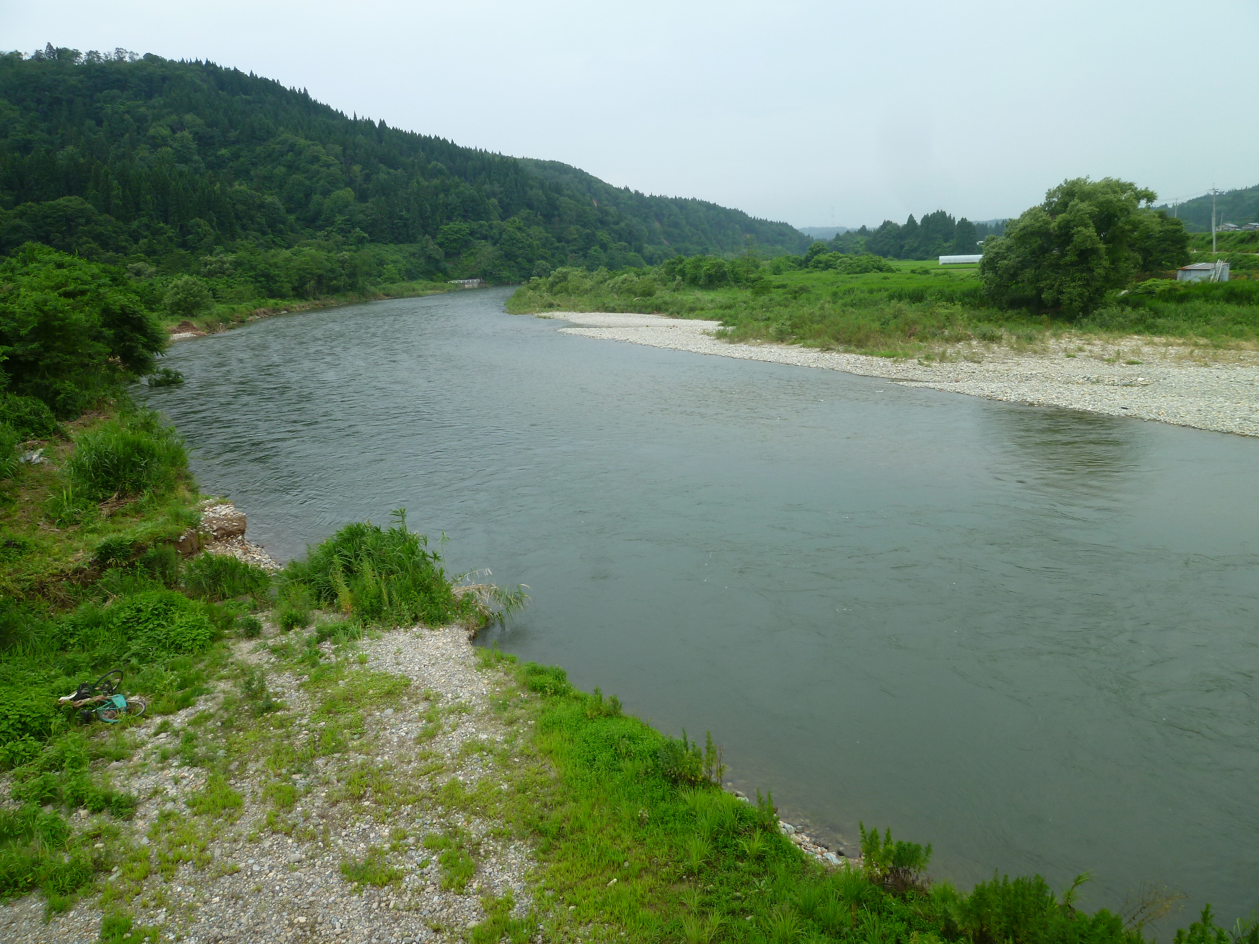 最上小国川。 山形県最上郡舟形町にて撮影。 山形県道31号舟形大蔵線の長者原橋の橋上から下流方向。